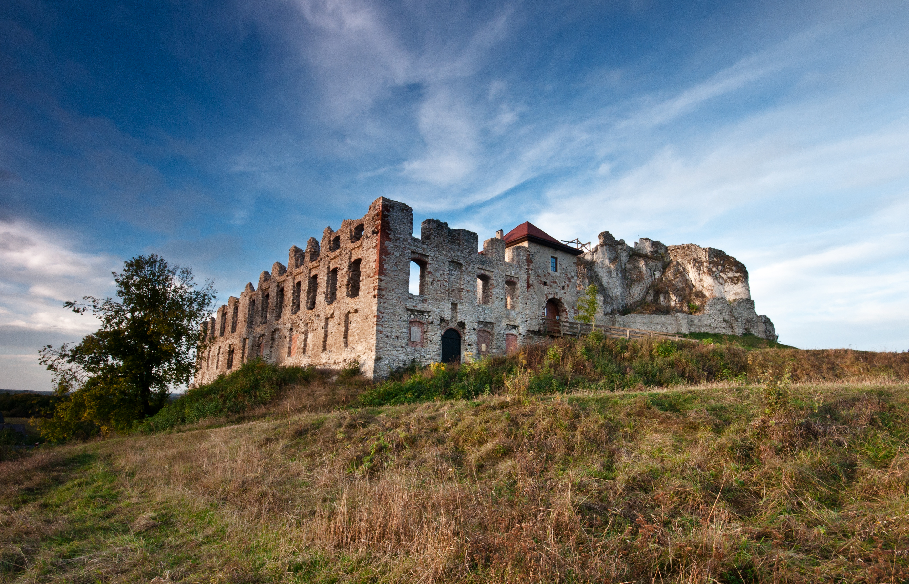 zamek w Rabsztynie